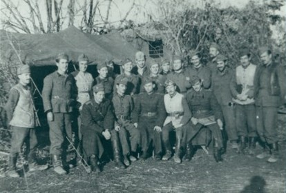 Войници от Втори армейски артилерийски полк на позицията при с. Летанце, Подуево (Сърбия) през Втората световна война. Сред тях е и поручик Стрез Стрезов.